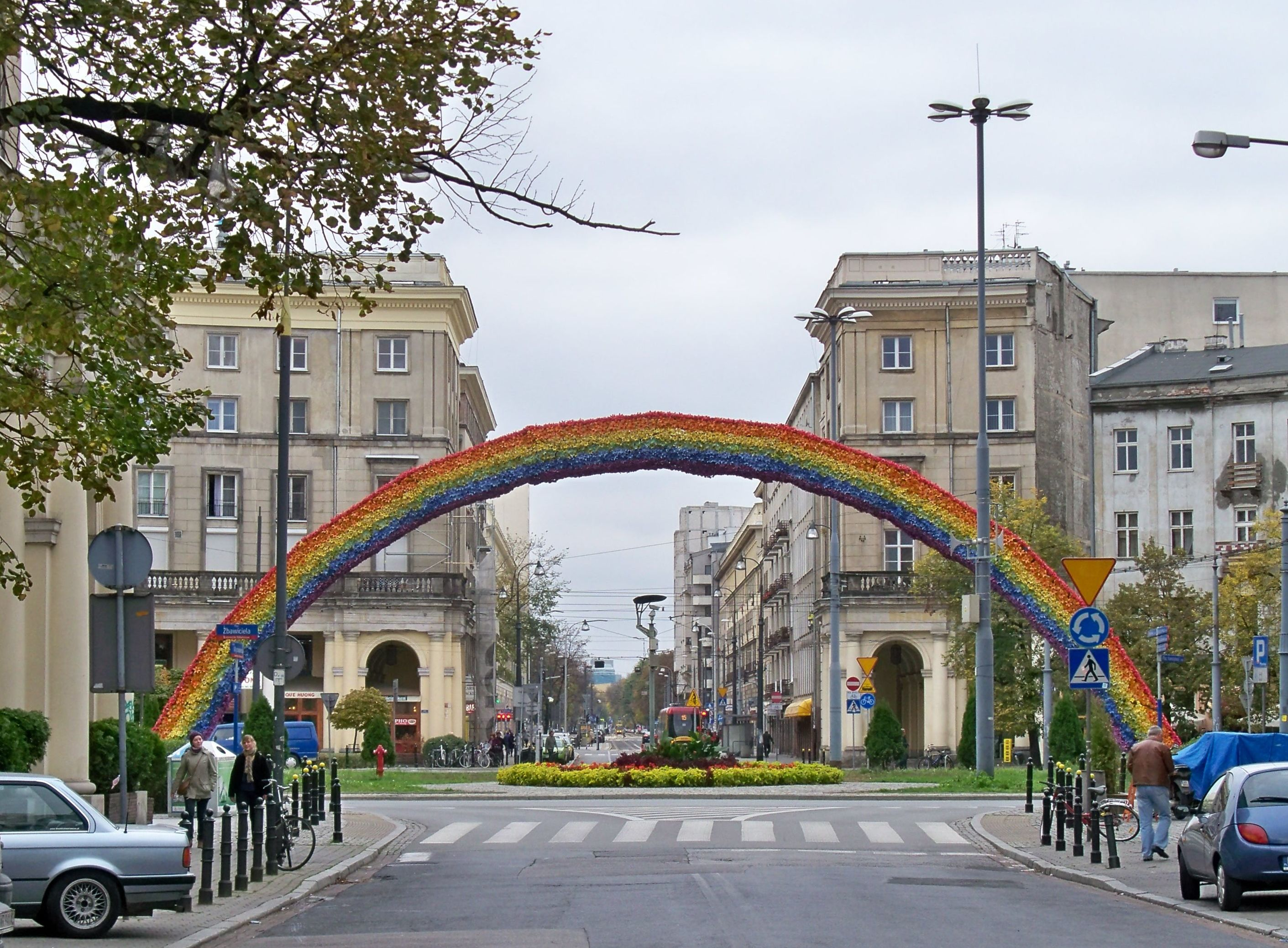 Tęcza na pl. Zbawiciela w Warszawie. Widok z al. Wyzwolenia w ul. Nowowiejską.